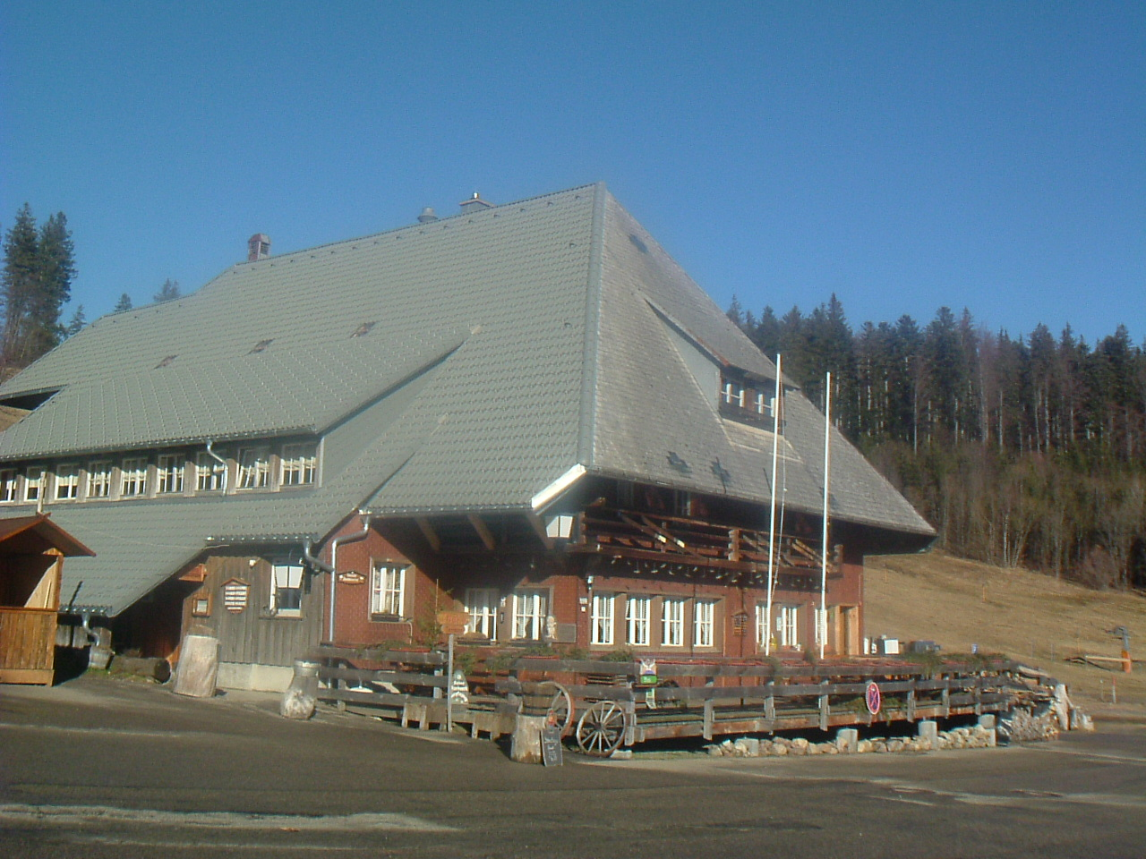 Stollenbacher Hütte, Blick von vorne